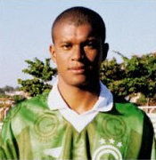 Dill jogador do Goiás